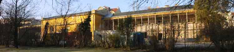 altes Palmenhaus Schoenbrunn - Baustelle